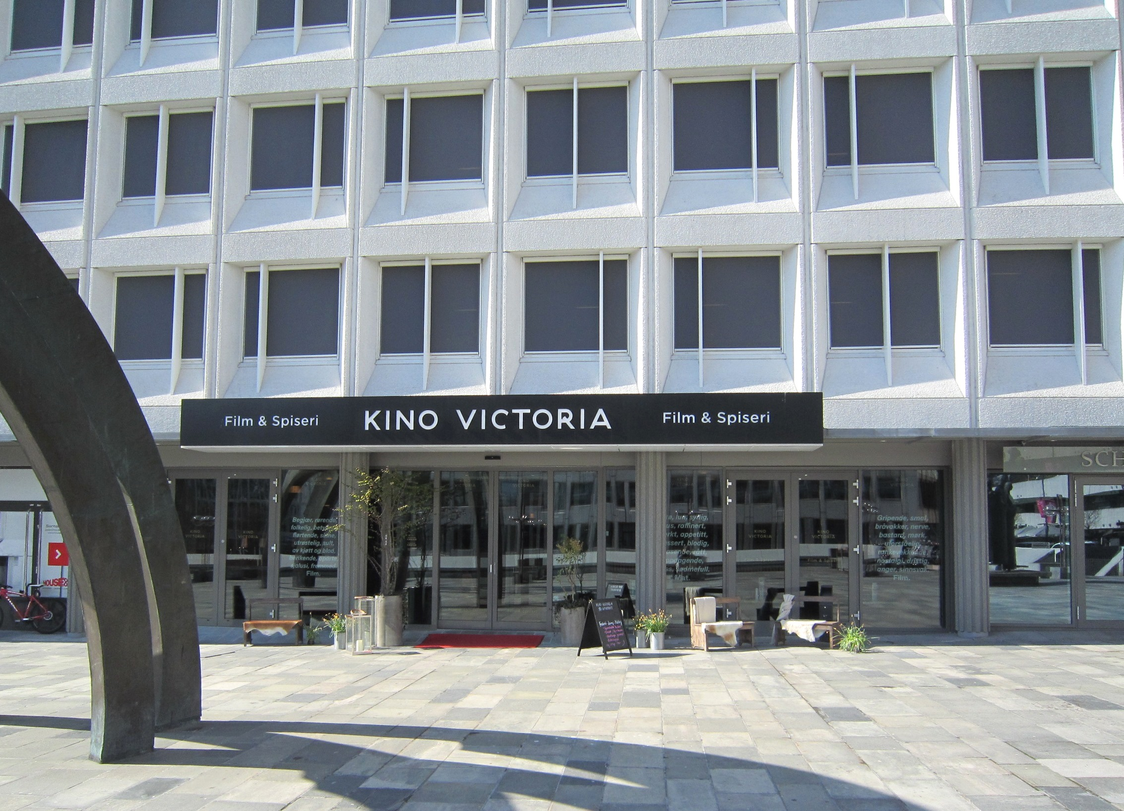 Kino Victoria Film & Spiseri, tidligere Vika kino, like ved Oslo konserthus